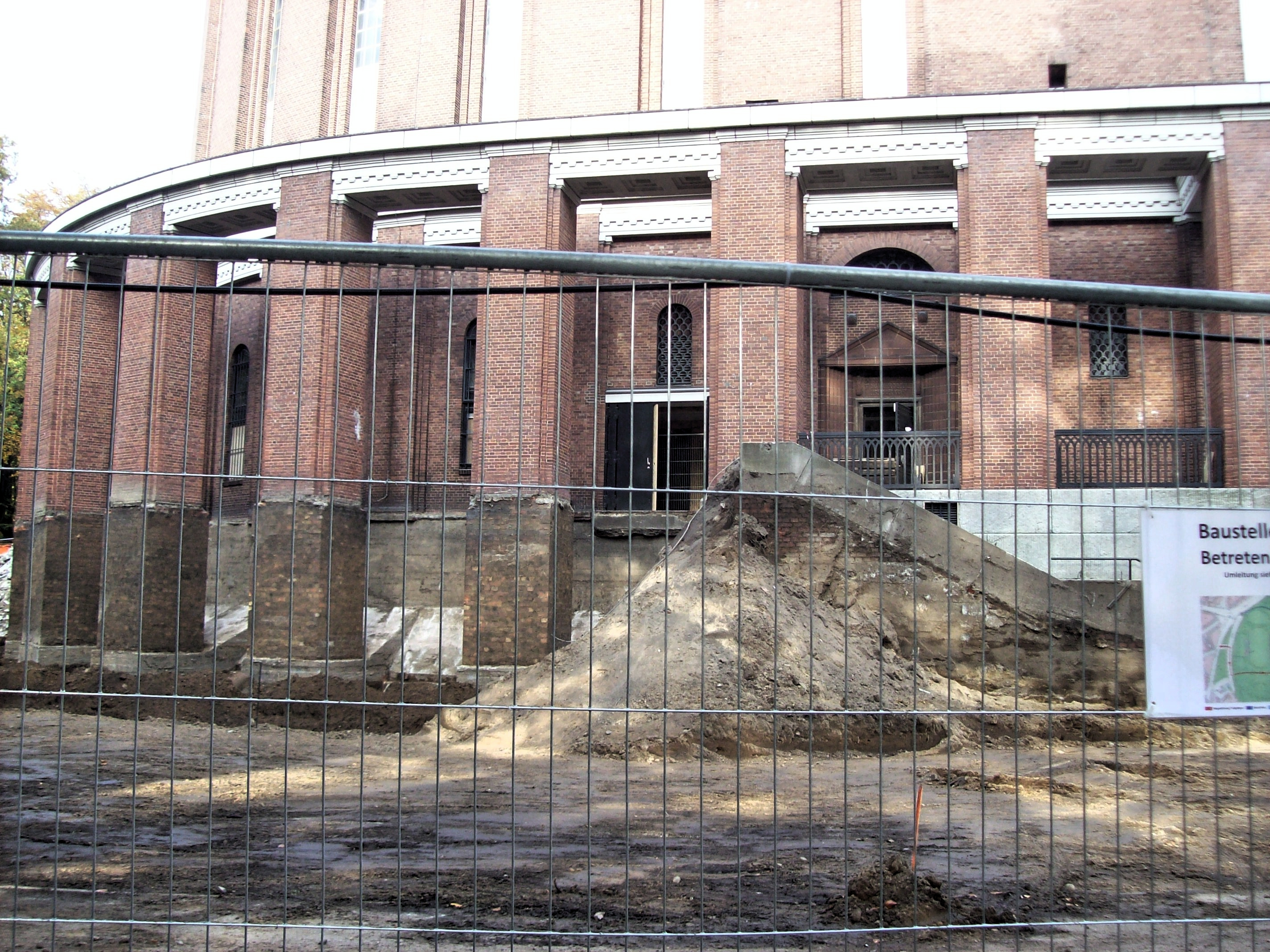 Das Planetarium im Hamburger Stadtpark befindet sich zur Zeit im Umbau. Geplante Wiedereröffnung im Januar 2017. Für Interessierte steht ein Info-Pavillon bereit. This is a photograph of an architectural monument.